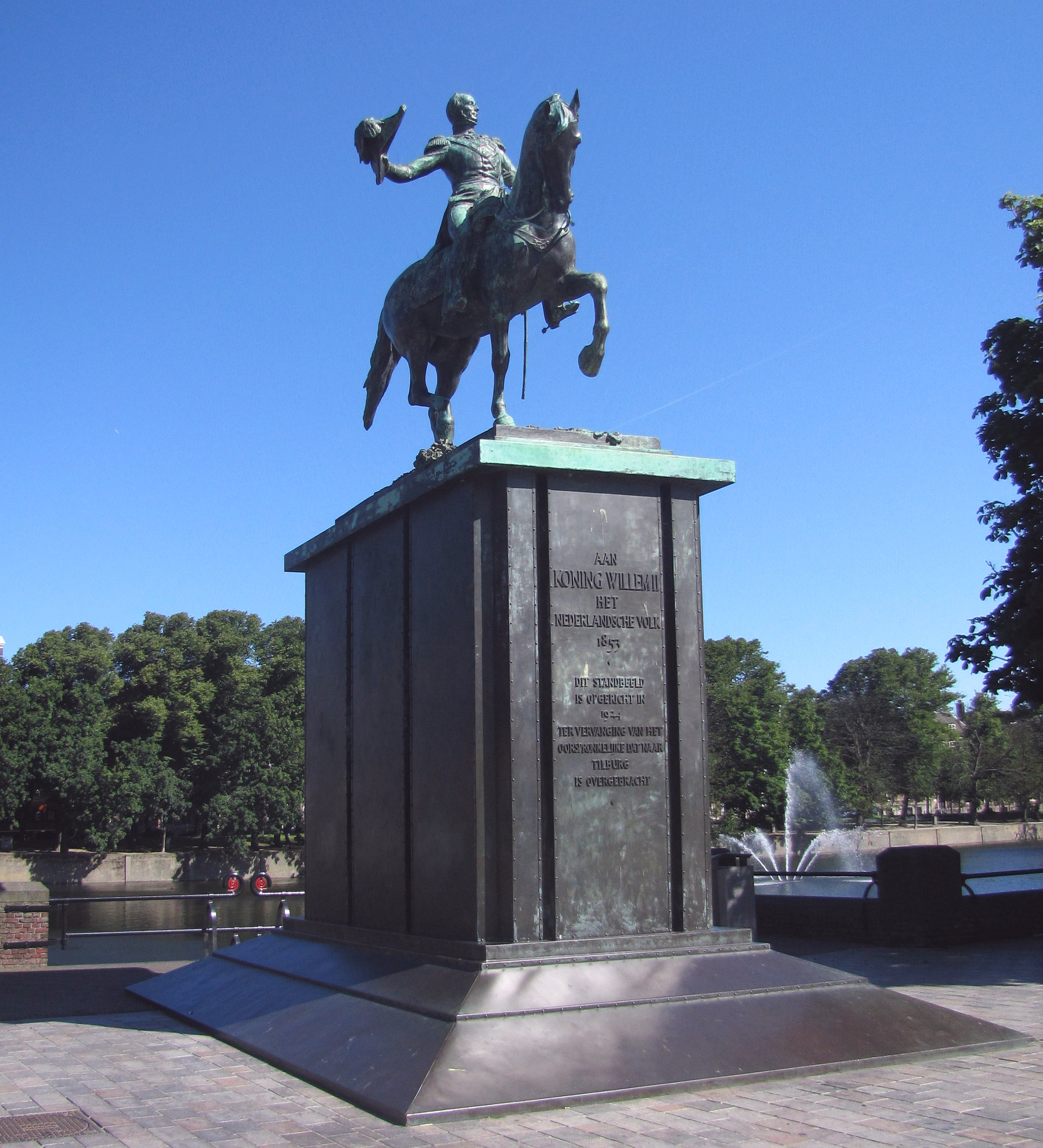 Ruiterstandbeeld voor Koning Willem II op het Buitenhof Den Haag Nederland - Foto Wolfgang Pehlemann IMG_1210